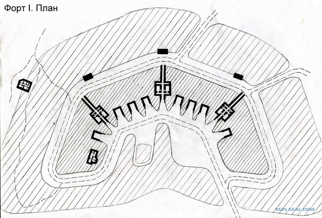 План 1-го форта и ДОТа на восточном валу.